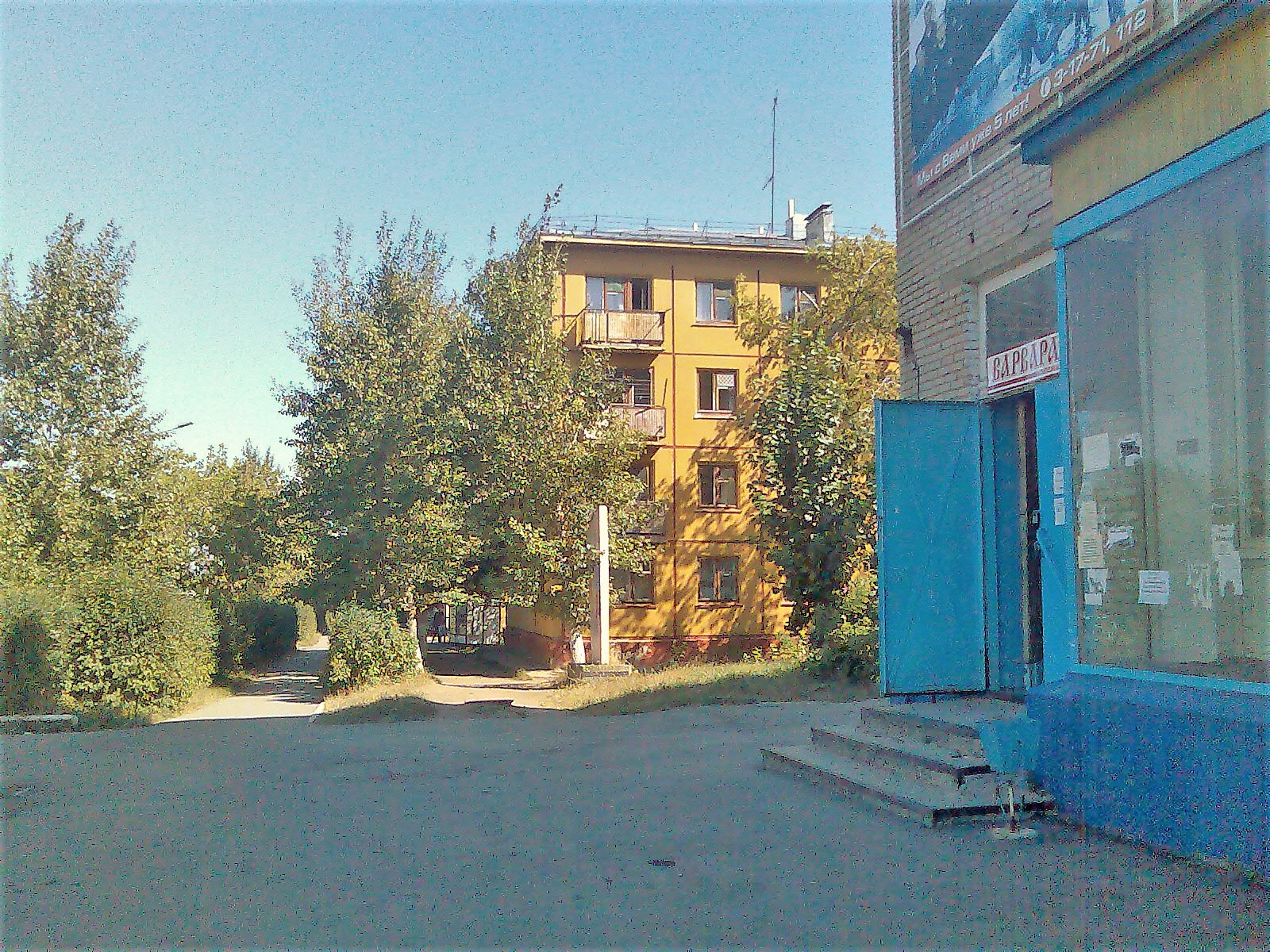 Посёлок Локомотивный